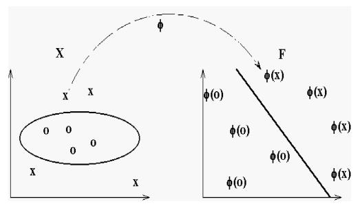 Función Kernel polinomial